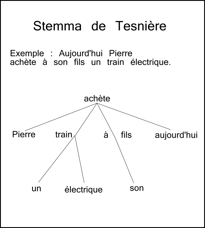 Schéma linguistique du célèbre stemma de Tesnières